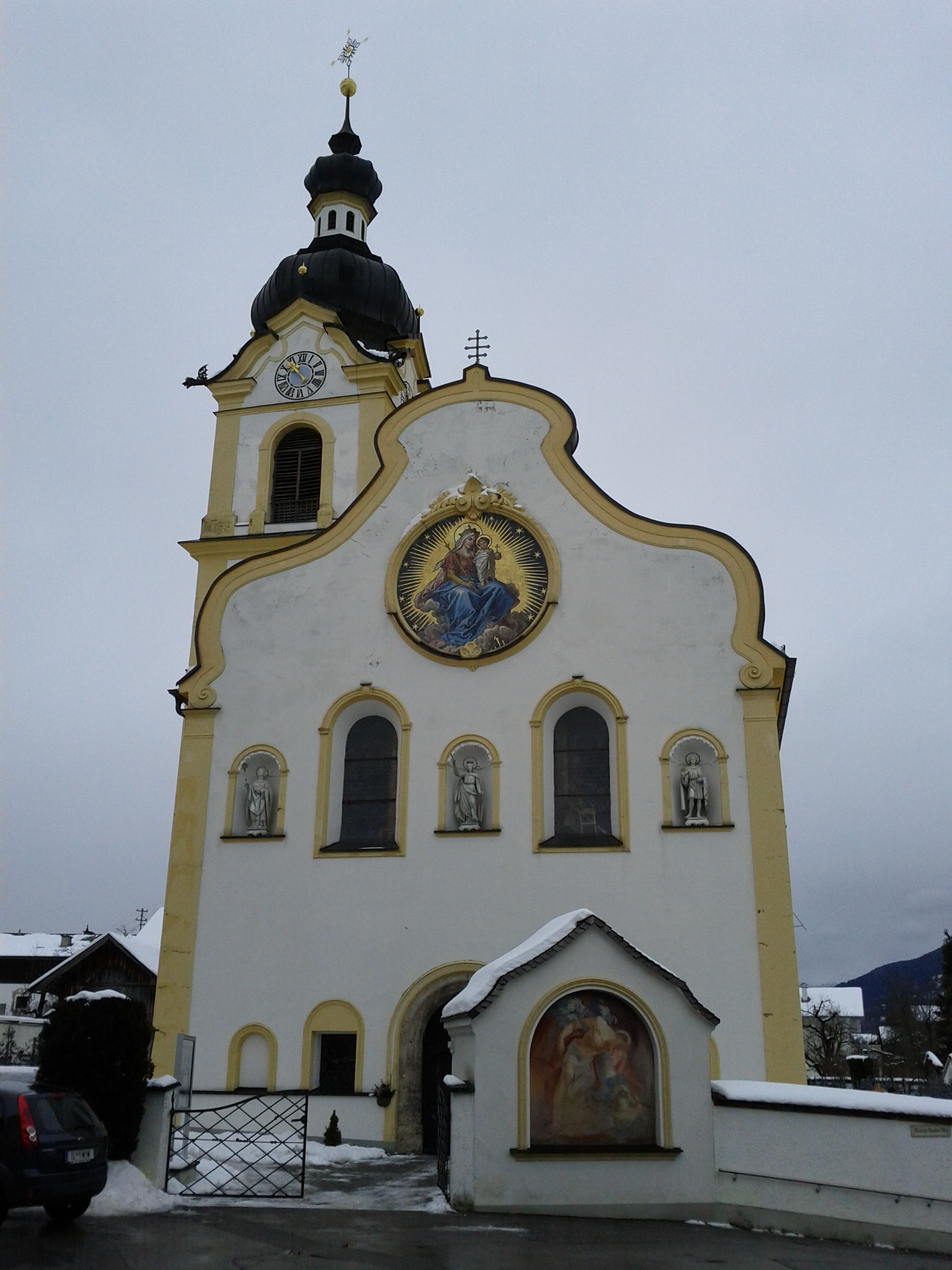 Katholische Pfarrkirche Hl. Margareta mit Friedhof